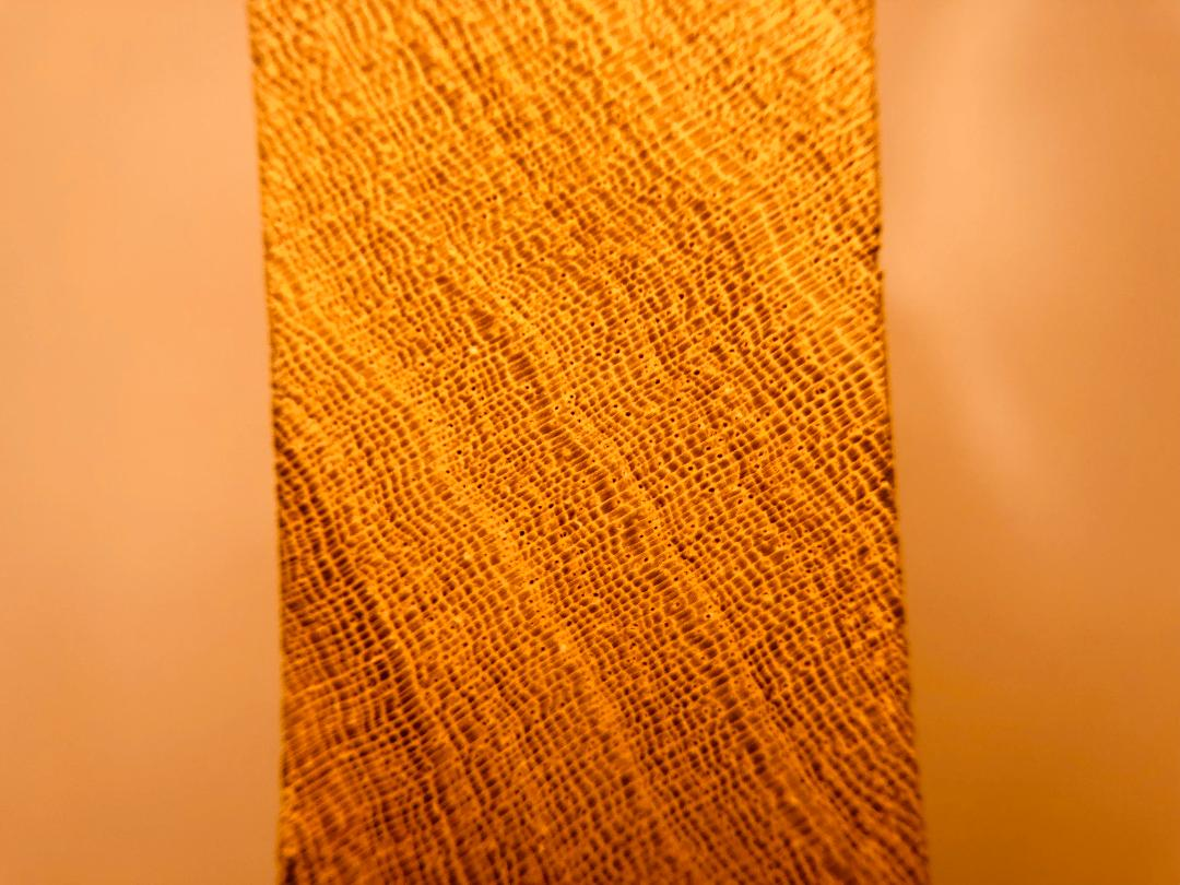 Die Stark ausgeprägten Parenchymbänder sind gut zu erkennen.